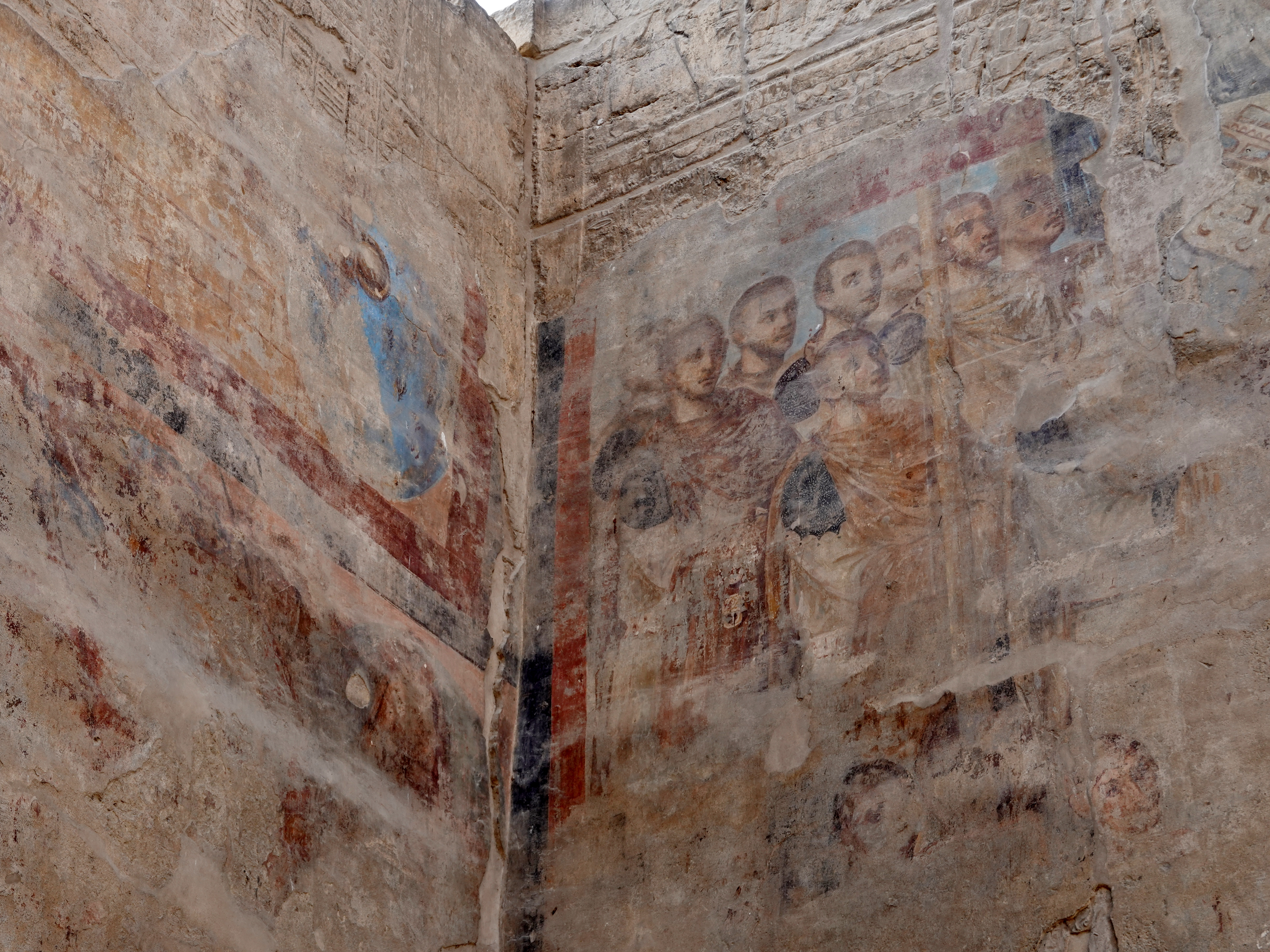 Römische Fresken im Erscheinungssaal des Luxor-Tempels in Luxor, Ägypten